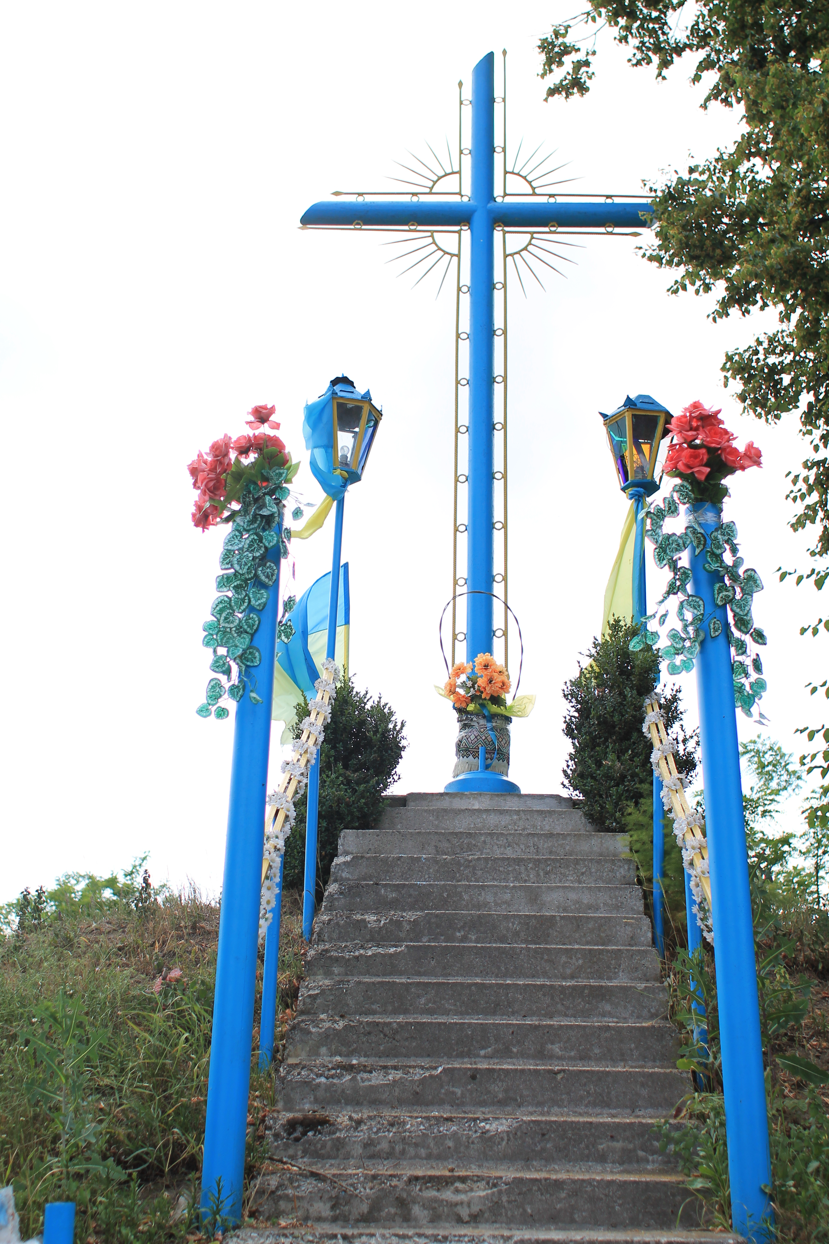 Худівці, 2